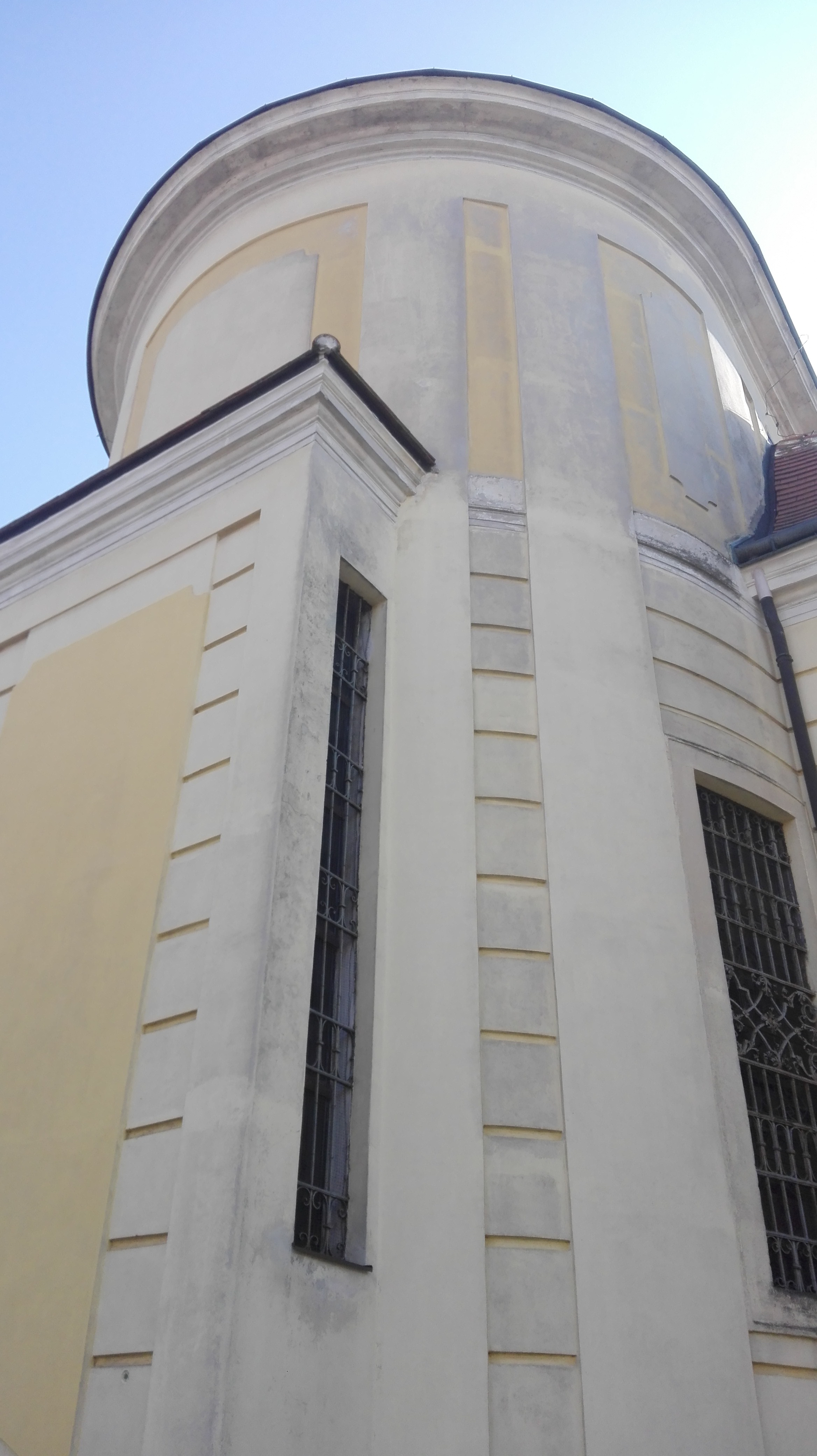 Dient als Hochaltargehäuse, vermutlich nachträglich